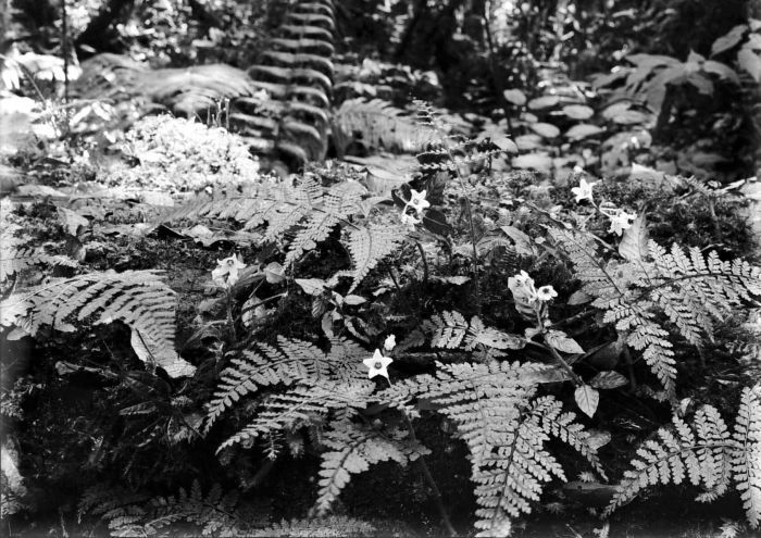 Repronegatif. Argostemma montanum di antara sejenis paku. Cibodas